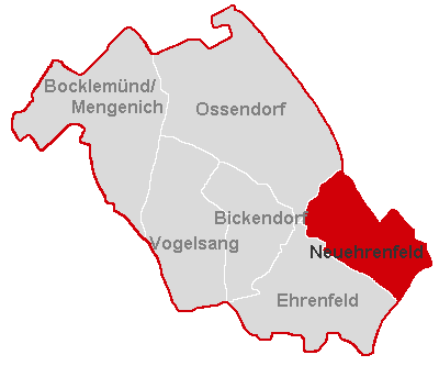 Lagekarte Neuehrenfeld im Stadtbezirk Köln-Ehrenfeld